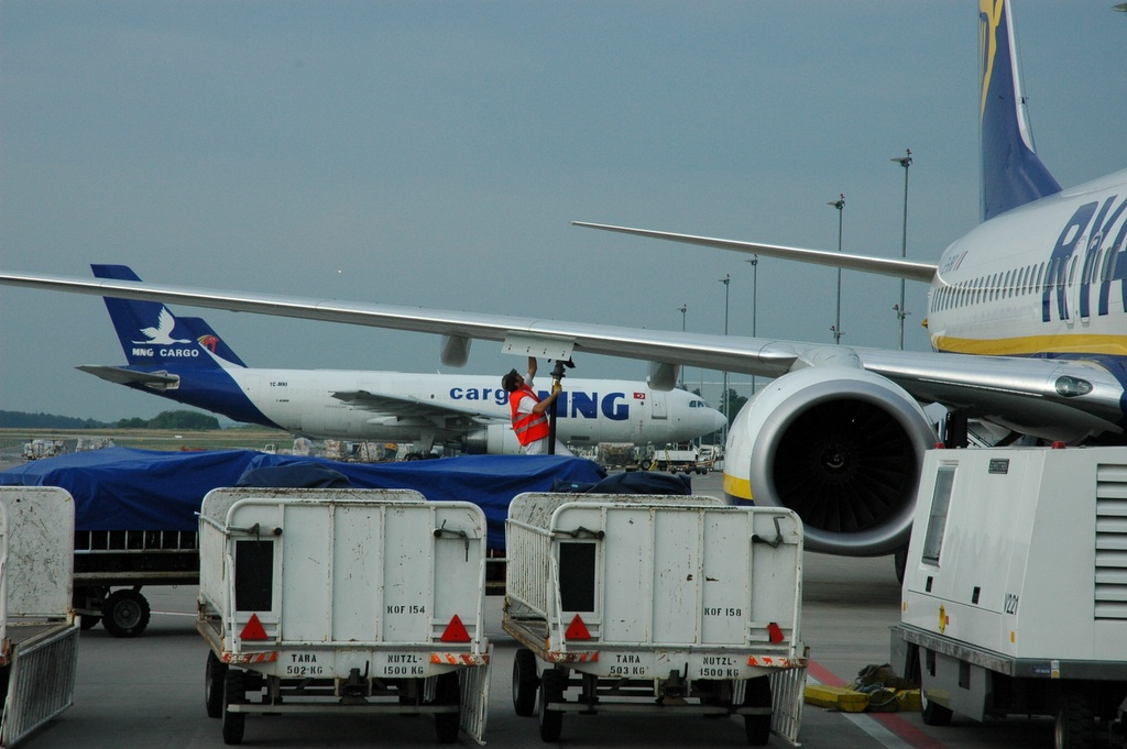 In Hahn...